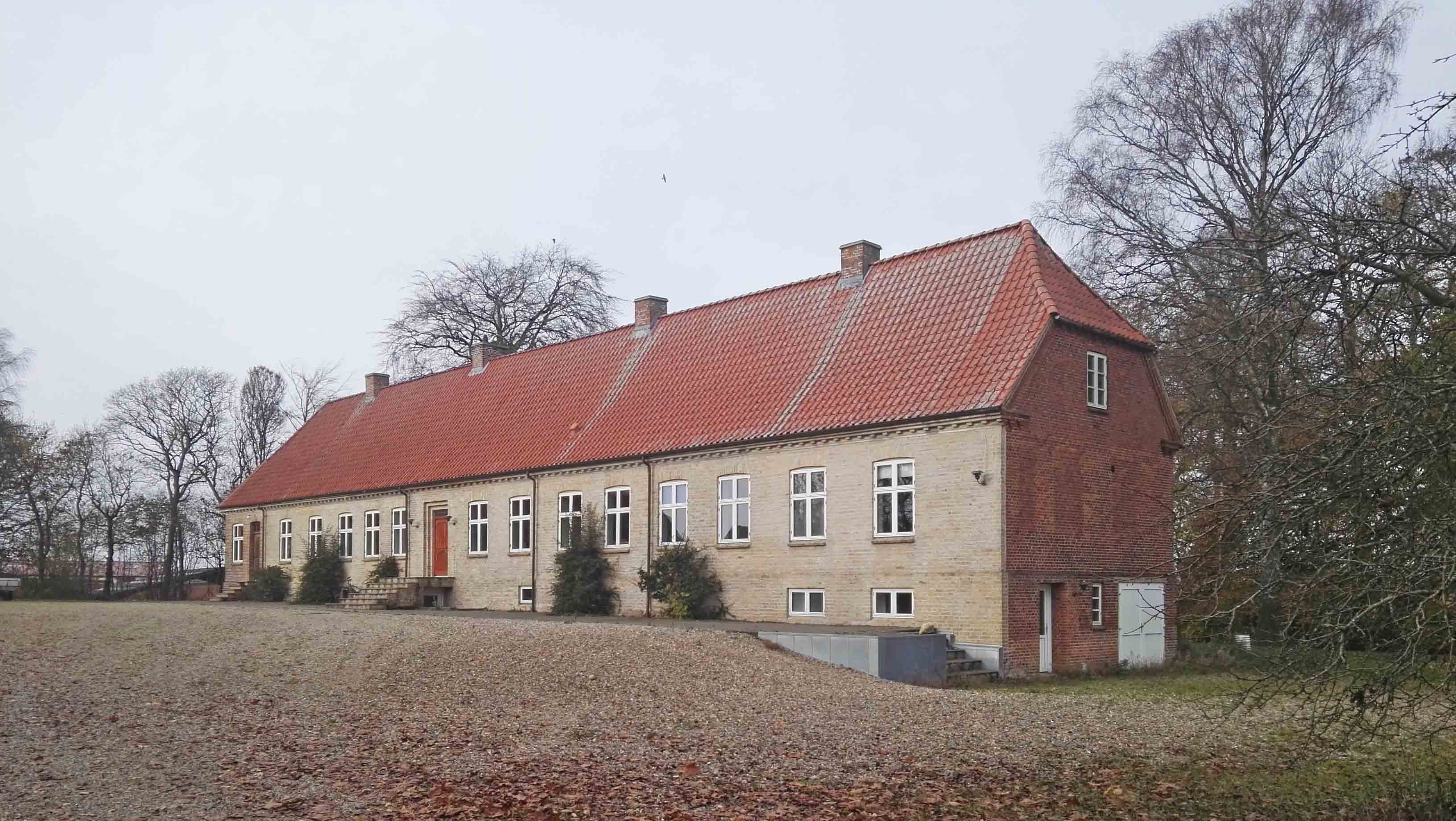 Hovedbygning til herregården Lundgaard ved Stoholm. Opført 1880, senere administrationsbygning for Lundgaard Teglværk.